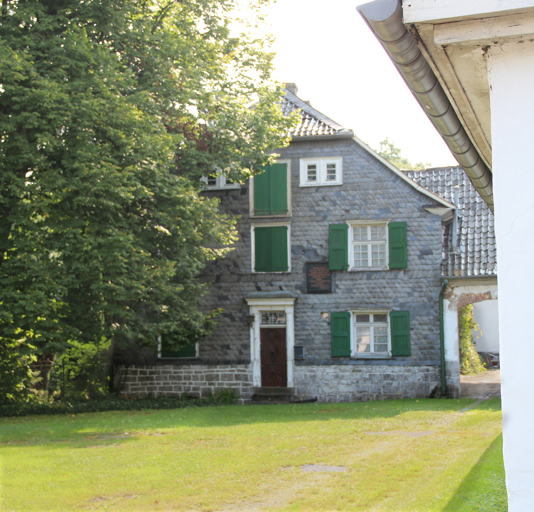 Gut Heresbach, Geburtshaus des Conrad Heresbach